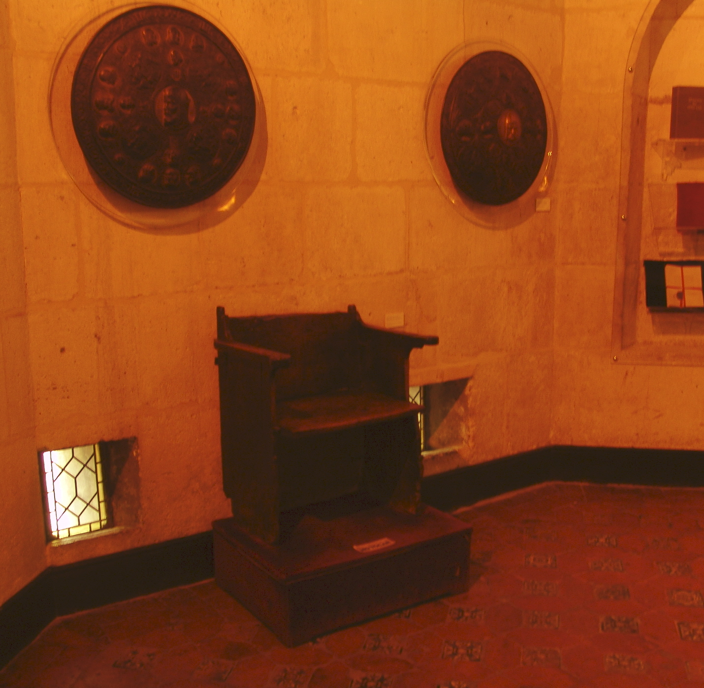 Sillón Jueces de Castilla, Laín Calvo y Nuño Rasura, Arco de Santa María, Burgos, España